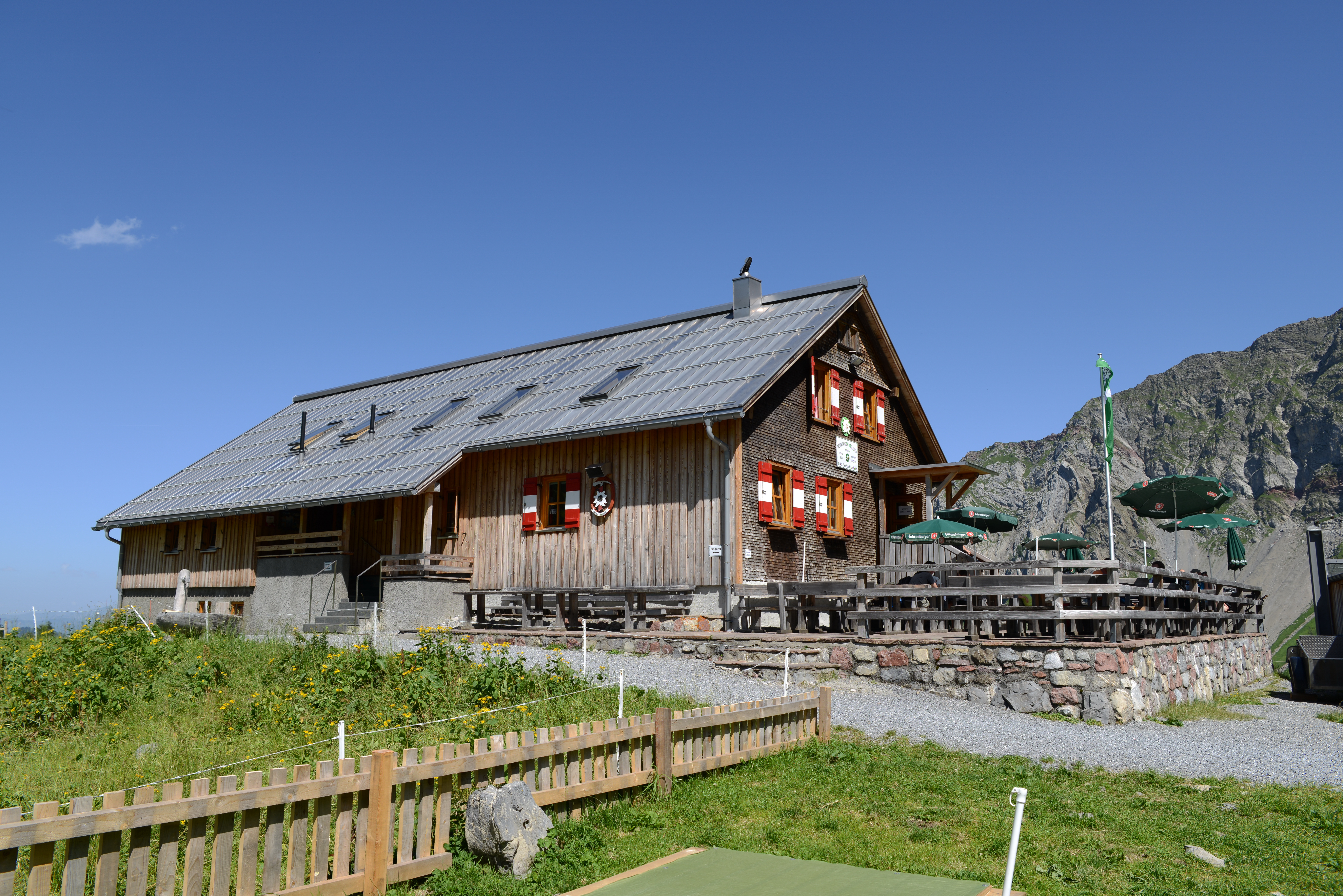 Die Oberzalimhütte ist eine Schutzhütte des Deutscher Alpenverein,DAV in Österreich. Sie liegt im Zalimtal oberhalb von Brand im Brandnertal, in auf 1889m ü.A.